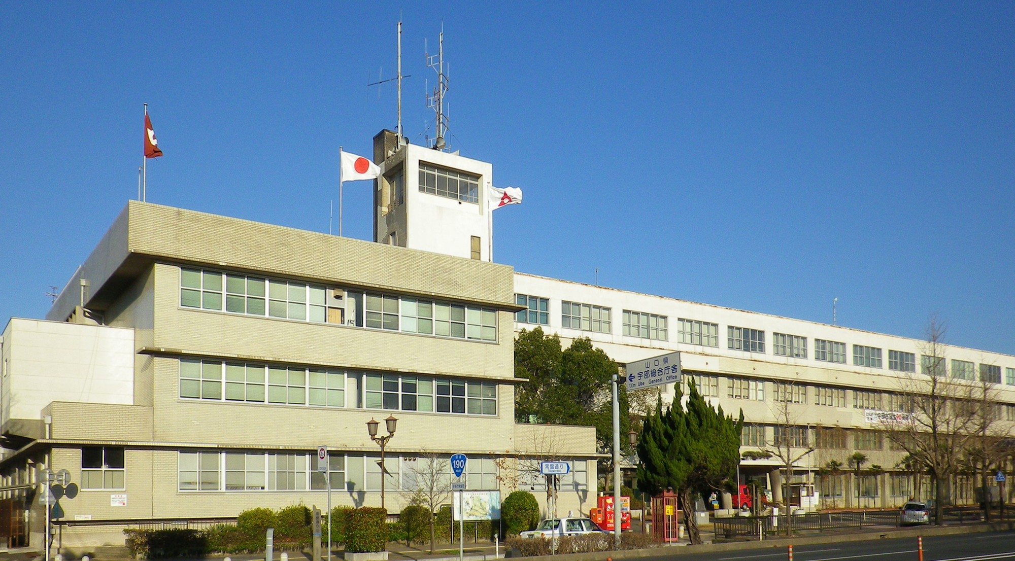 宇部市役所。2012年1月30日撮影。